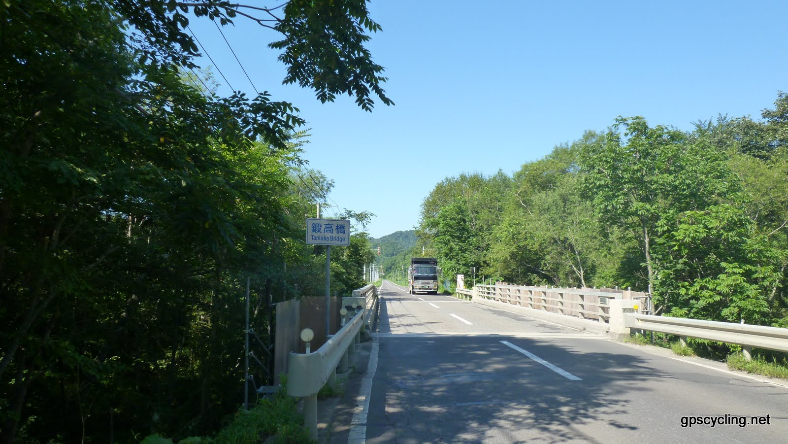 Tantaka Bridge/鍛高橋